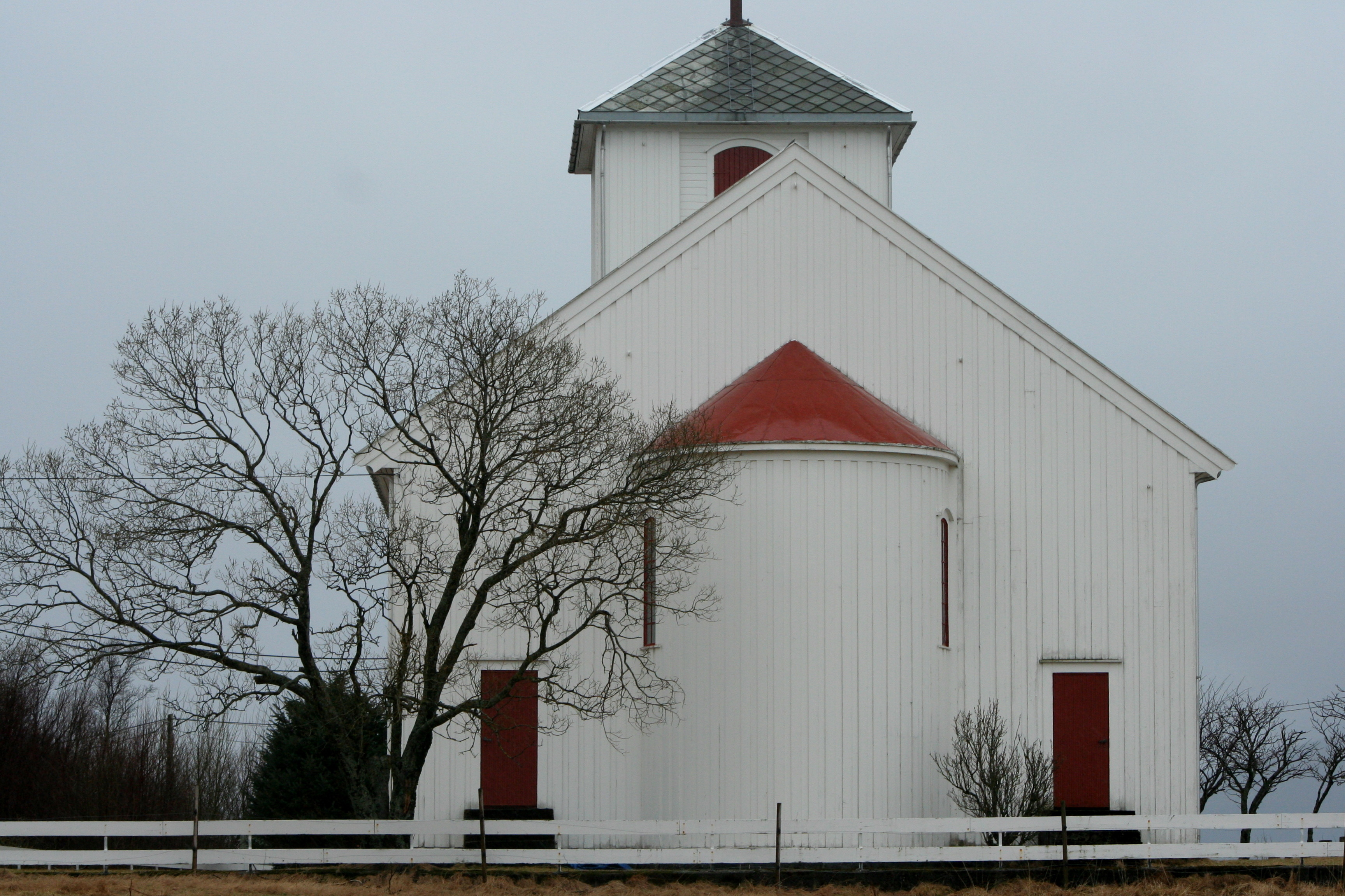 Hildre church